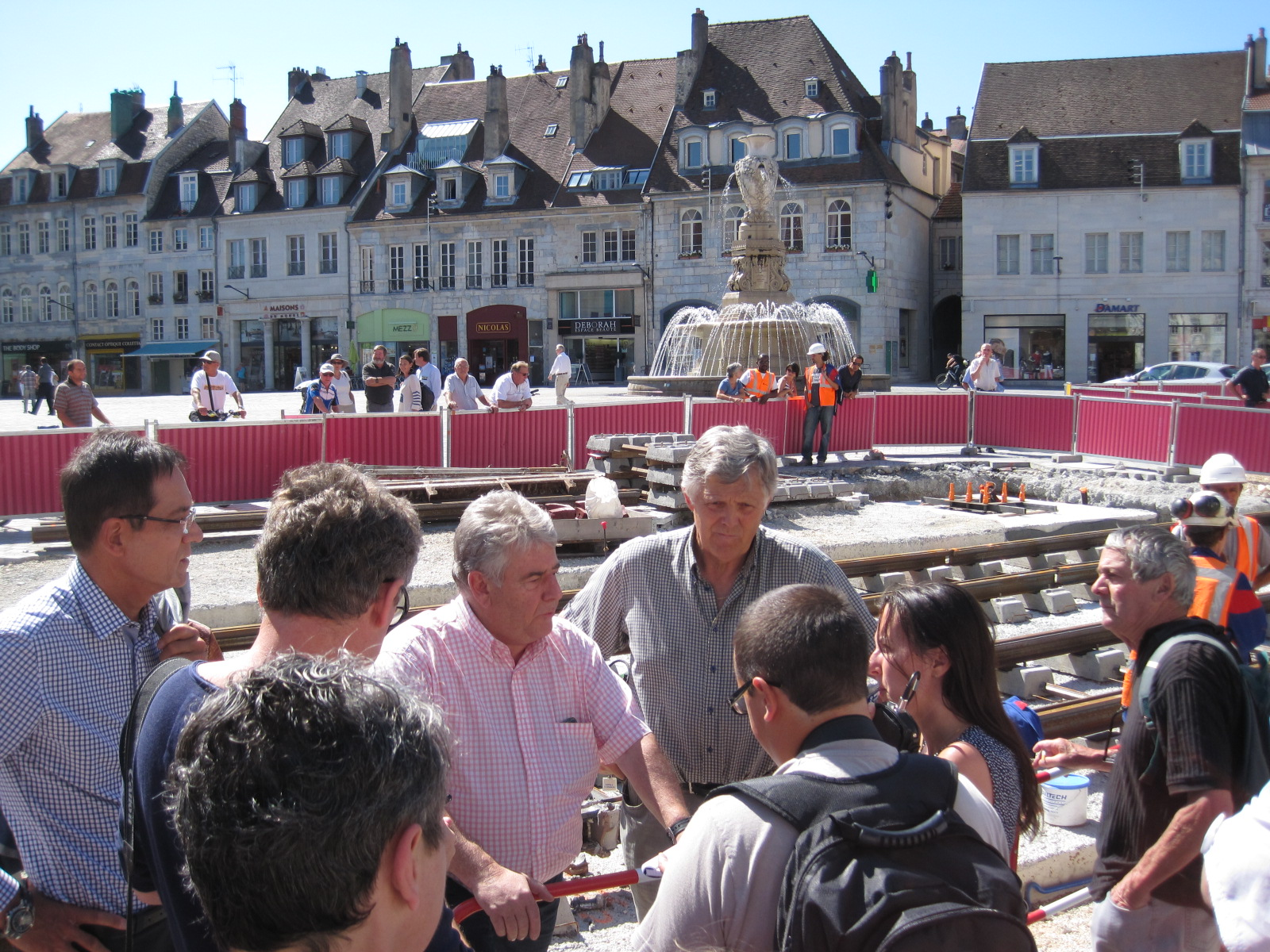 Inauguration de la pause des premier rails du tramway de Besançon, sur la place de la Révolution, par le maire de Besançon Jean-Louis Fousseret